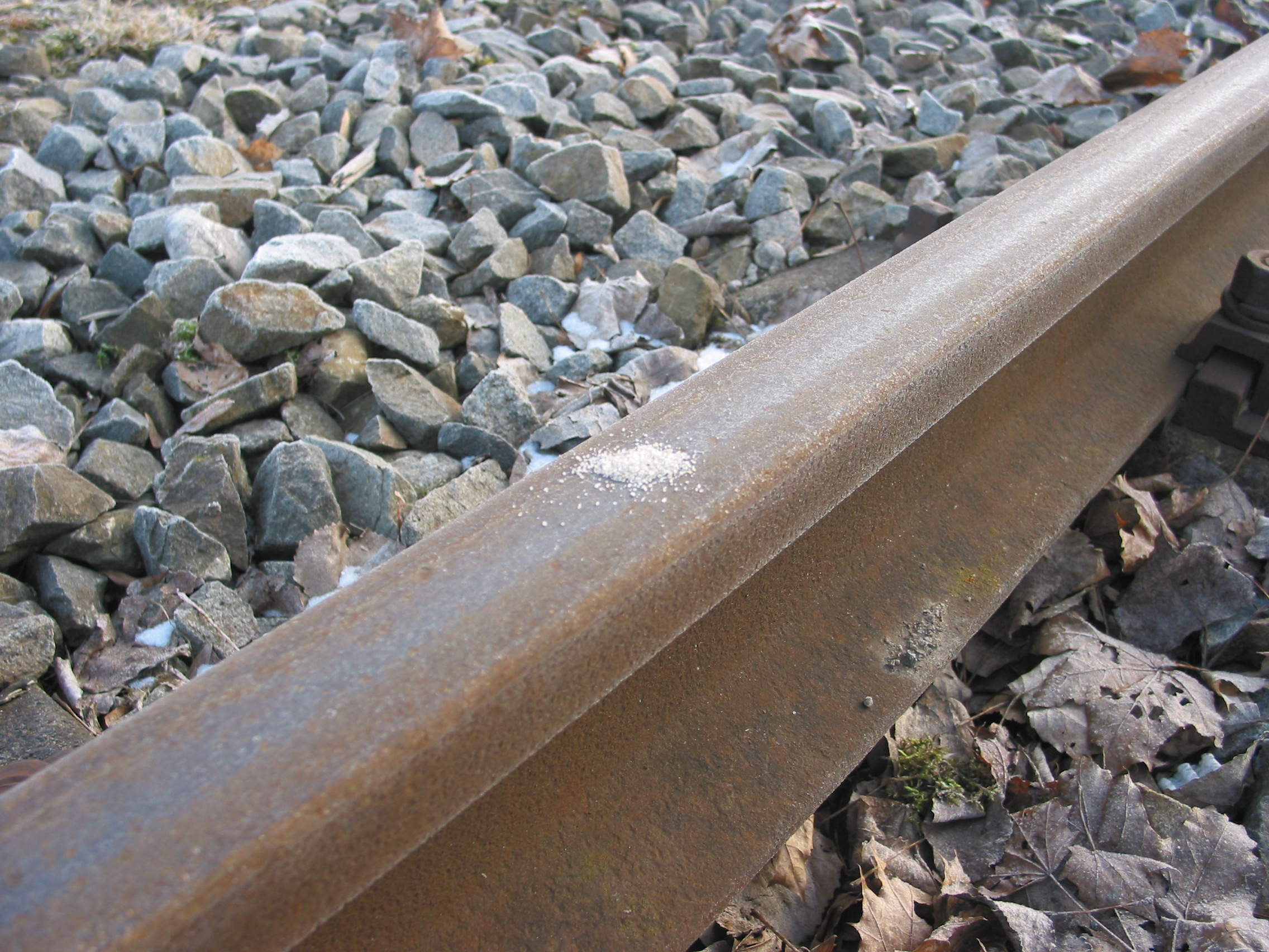 Bremssand/Quarzsand auf einer Eisenbahnschiene